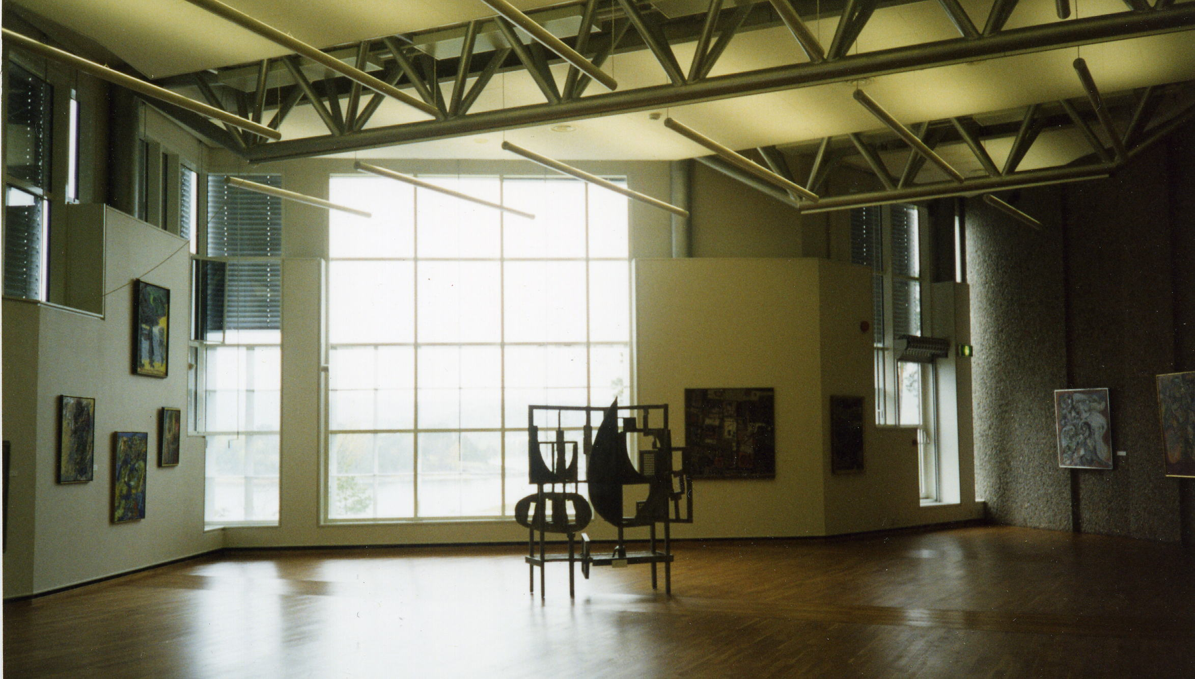 Centre d'art Henie-Onstad à Hovikodden près d'Oslo